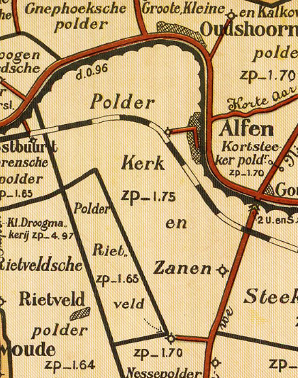 Kerk en Zanen